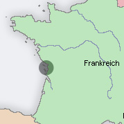 Karte für den Artikel "Austern" in der deutschen Wikipedia